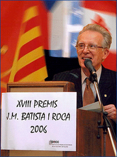 Enric Garriga Trullols als XVIII Premis J.M. Batista i Roca del 2006